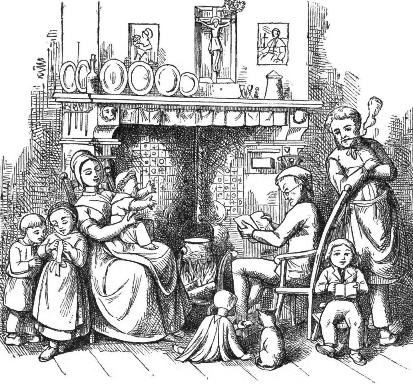 Beeldmerk van het Vlaamse tijdschrift Rond den Heerd